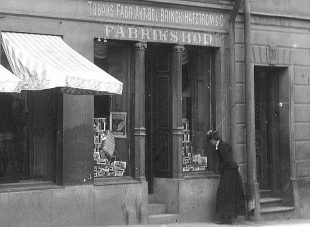 Brinck Hafström & Co:s Fabriksbod på Hornsgatan 32